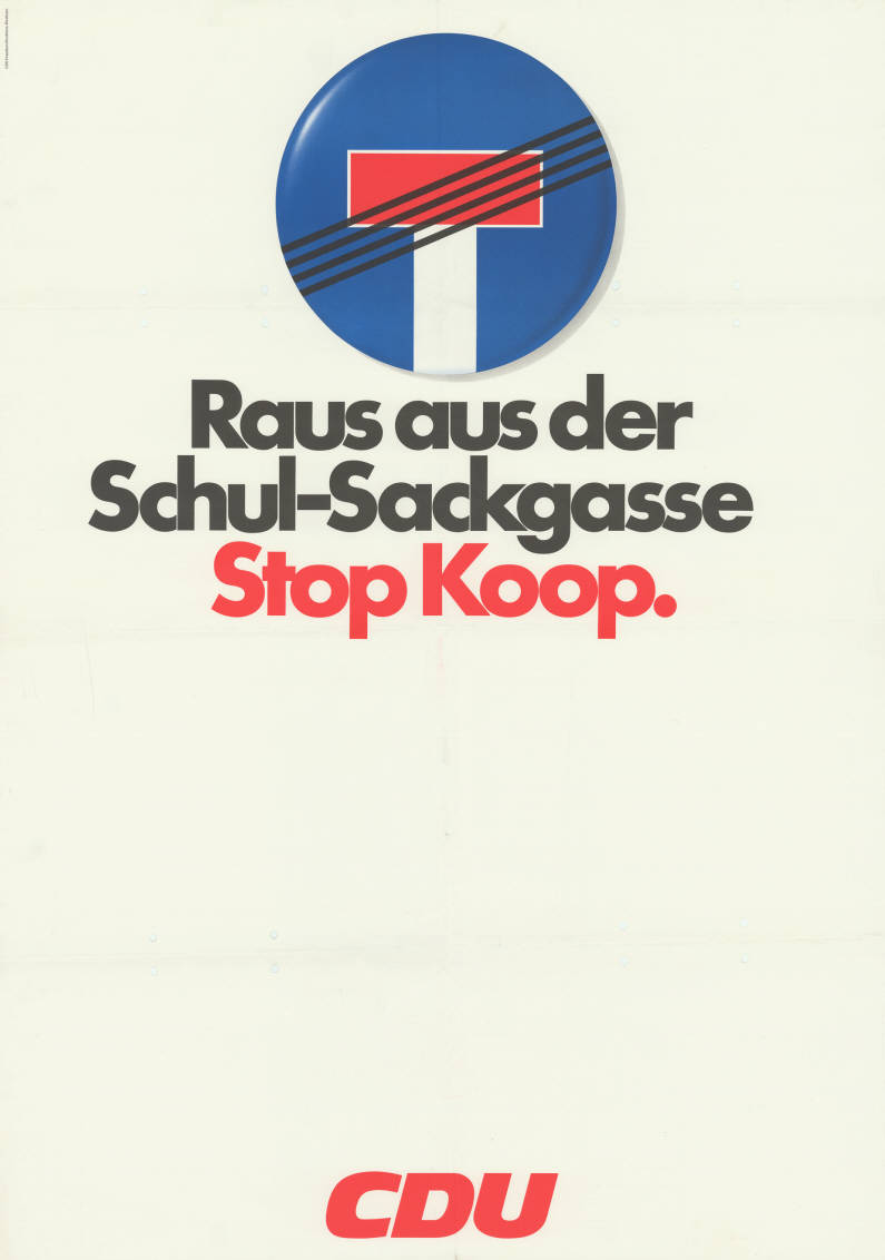 Raus aus der Schul-Sackgasse Stop Koop. CDU Abbildung: Durchgestrichenes Schild für Sackgasse Plakatart: Motiv-/Textplakat Auftraggeber: CDU Präsidium Nordrhein-Westfalen Objekt-Signatur: 10-031 : 741 Bestand: CDU-Plakate (10-031) GliederungBestand10-18: Motivplakate Lizenz: KAS/ACDP 10-031 : 741 CC-BY-SA 3.0 DE